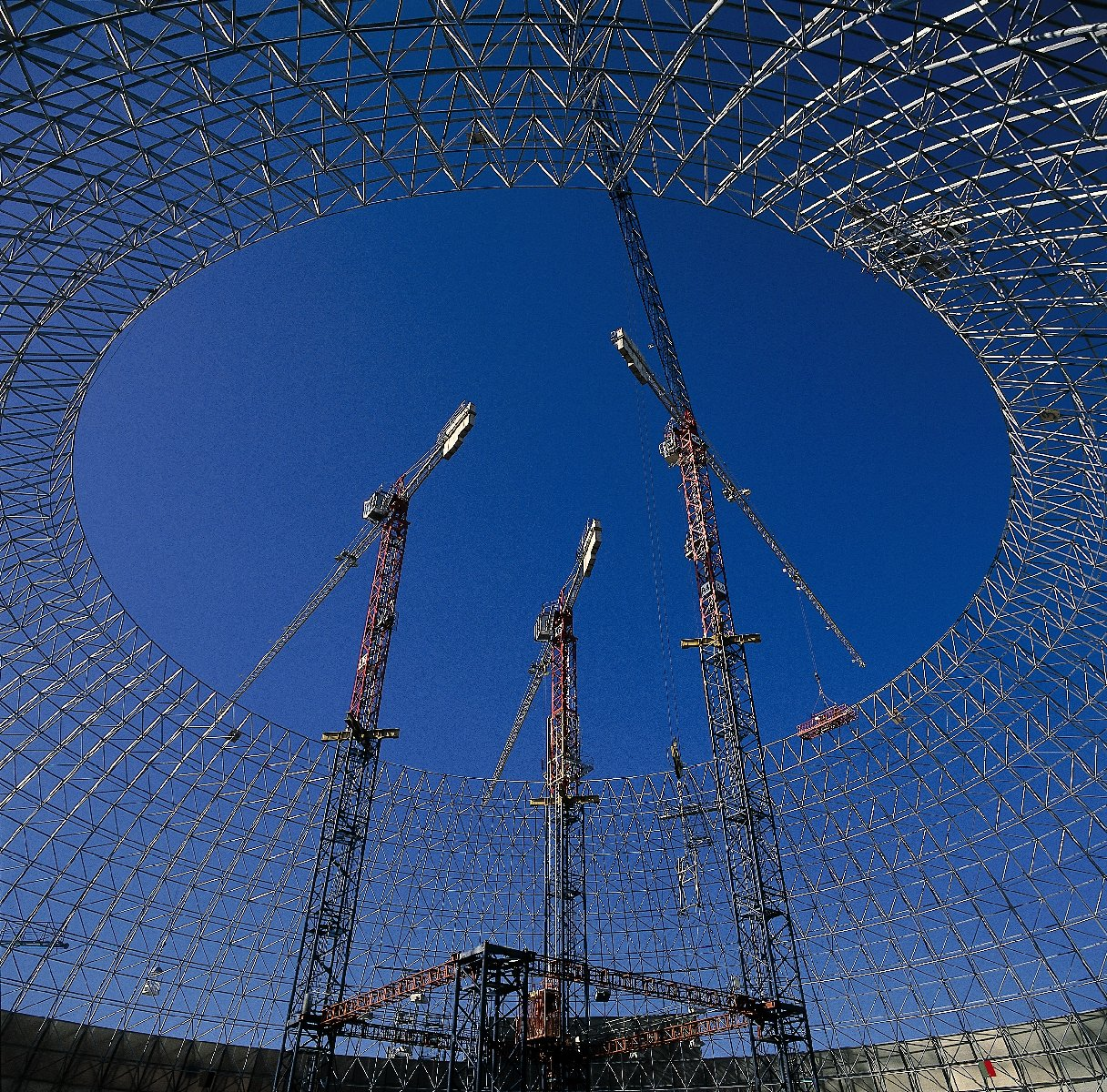 Bau der Stockholm Arena Autor : MERO-TSK Gmbh